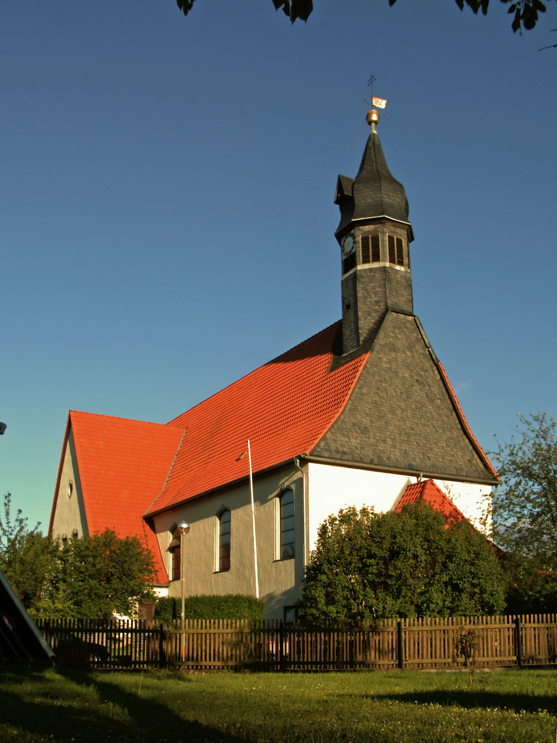 Katholische Kirche Maria Himmelfahrt in Wiedelah, Ortsteil von Vienenburg